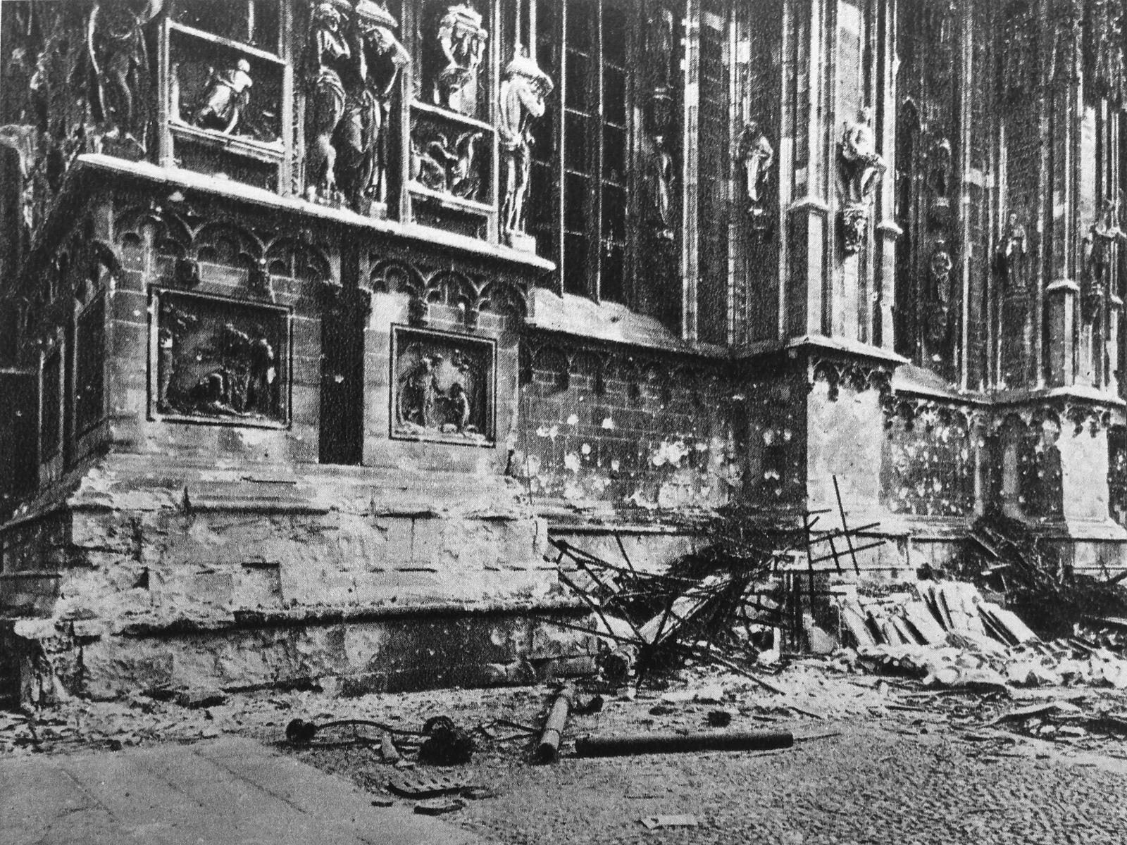 Duomo (Milan) after allied bombing 1943, roof